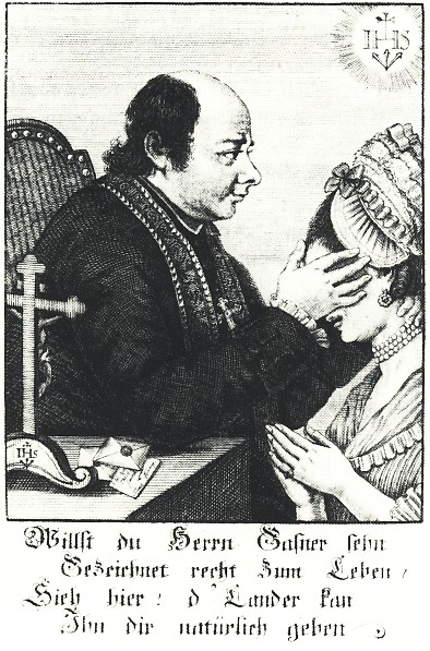 Kupferstich, der den Wunderheiler Johann Joseph Gaßner zeigt.